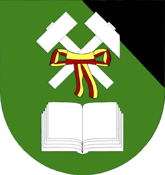 Znak obce Zastávka v okrese Brno-venkov